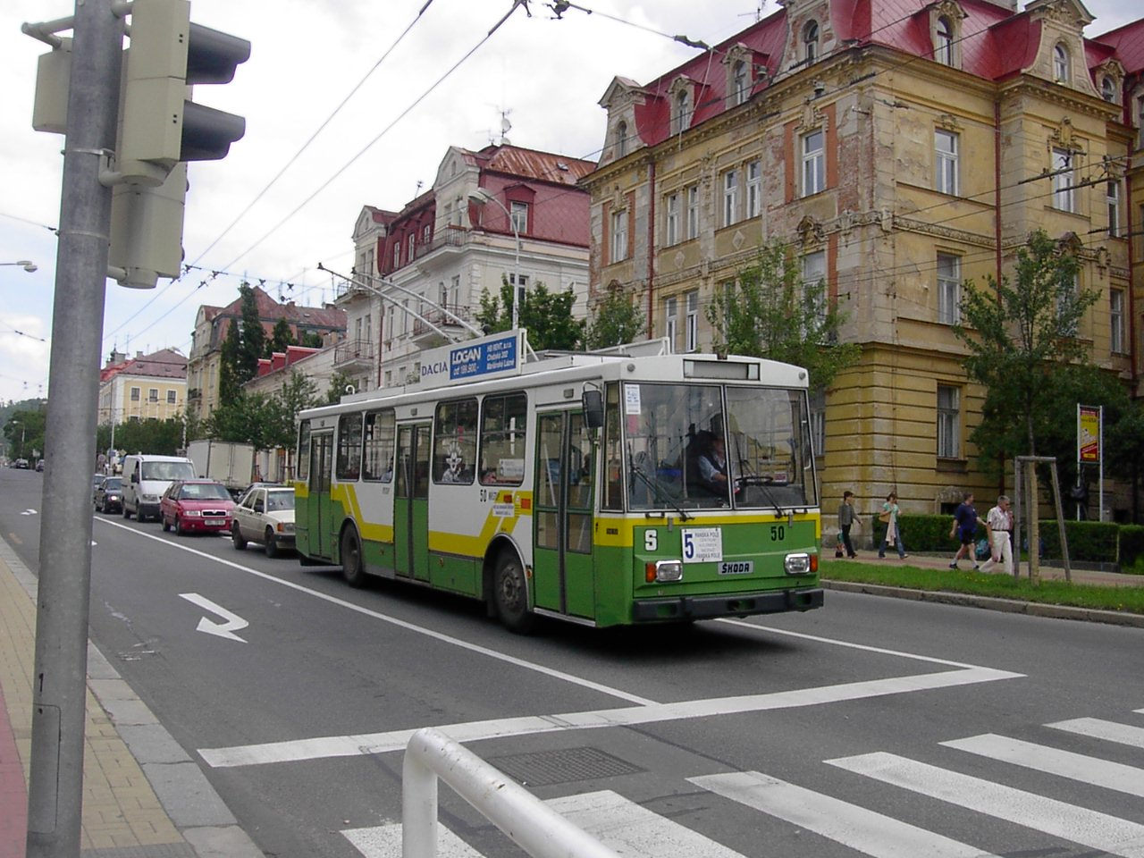 Trolejbus 14Tr v Mariánských Lázních. Trolley-bus 14 Tr in Marienbad. O-Bus 14Tr in Marienbad.